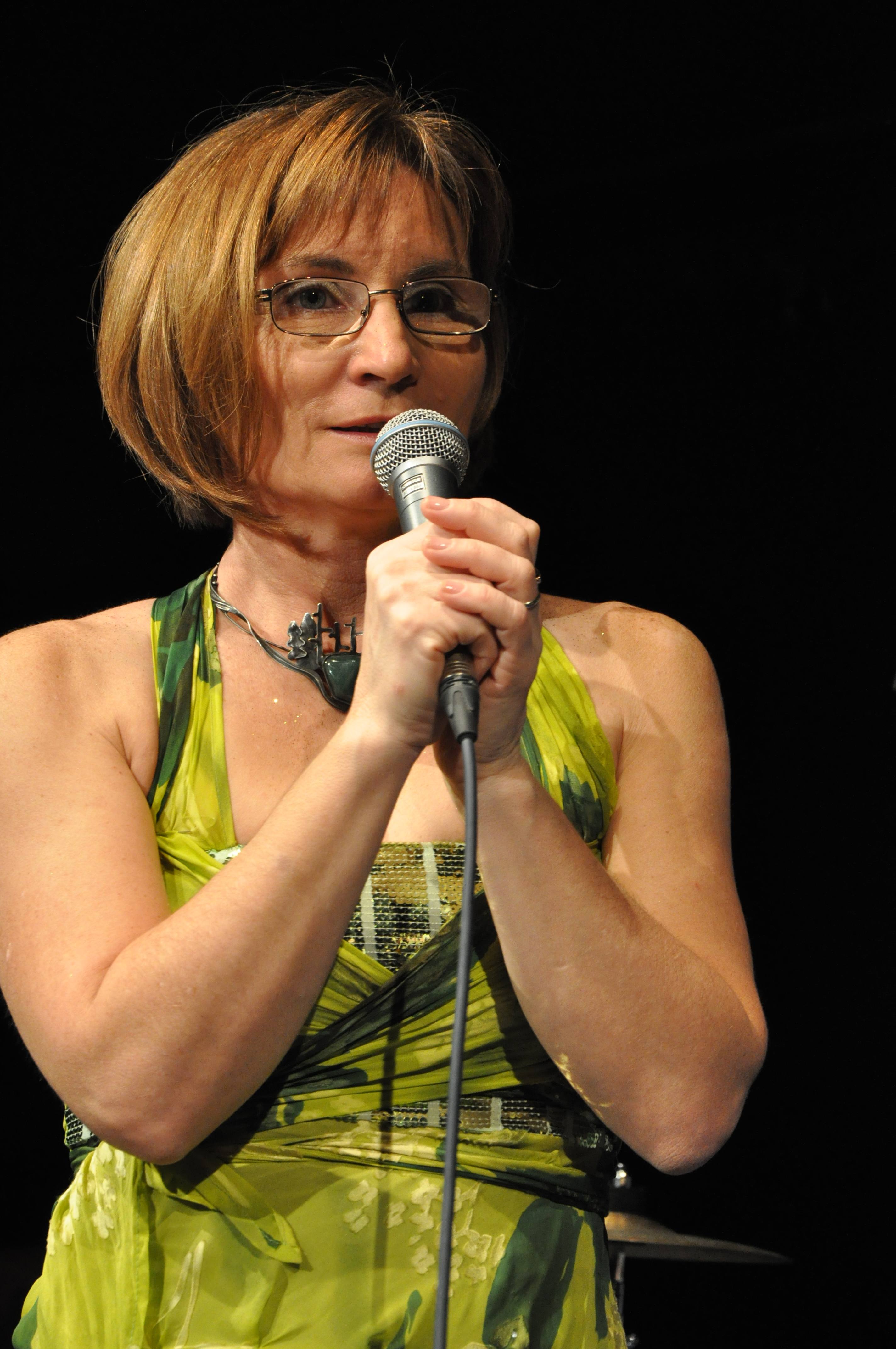 Jana Drápalová, starostka Městské části Brno-Nový Lískovec a první místopředsedkyně Strany zelených, na Zeleném plese 22. února 2014 v Brně. Více fotografií na .